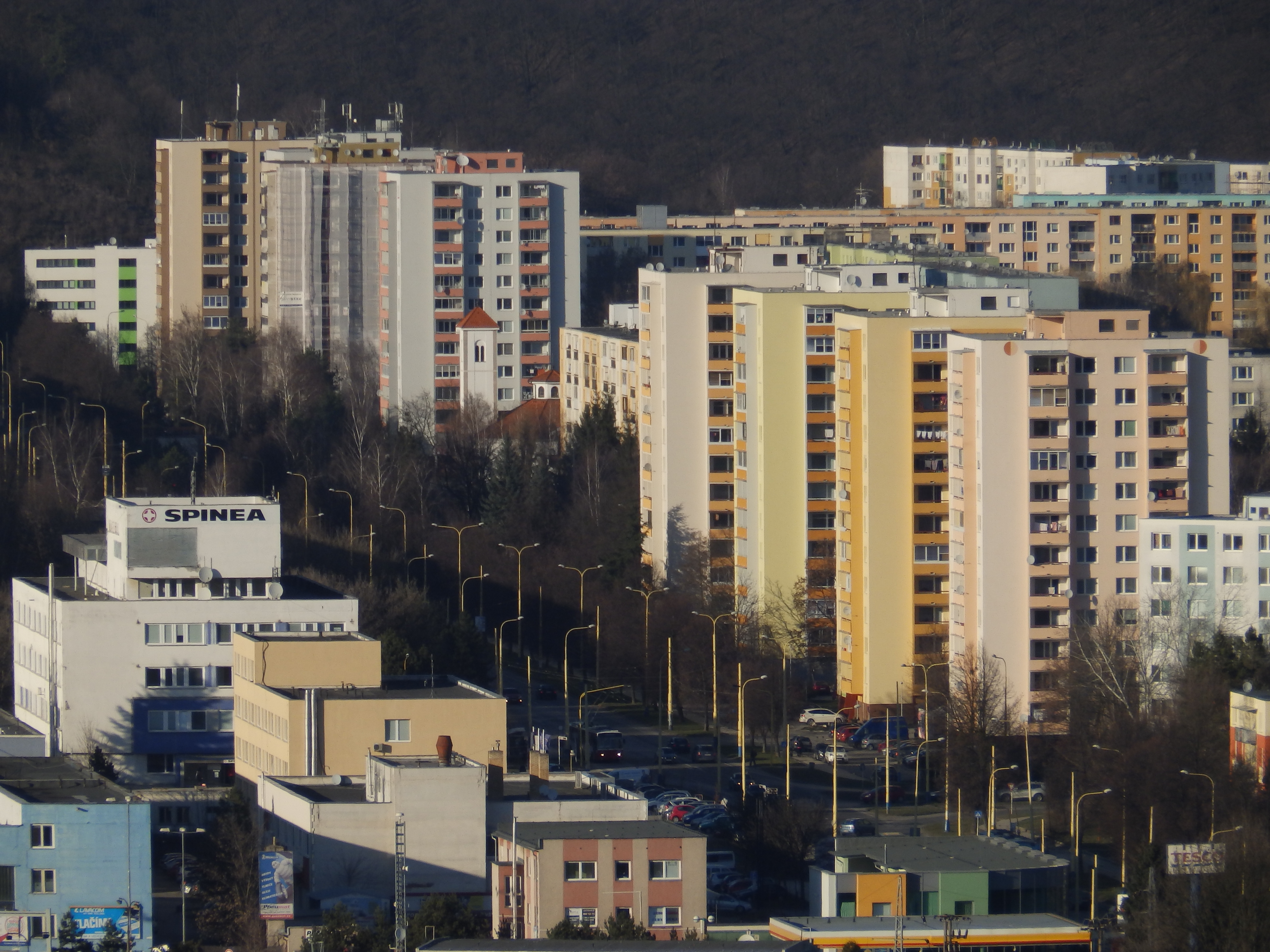 Prostějovská ul., Prešov - Sídlisko 3